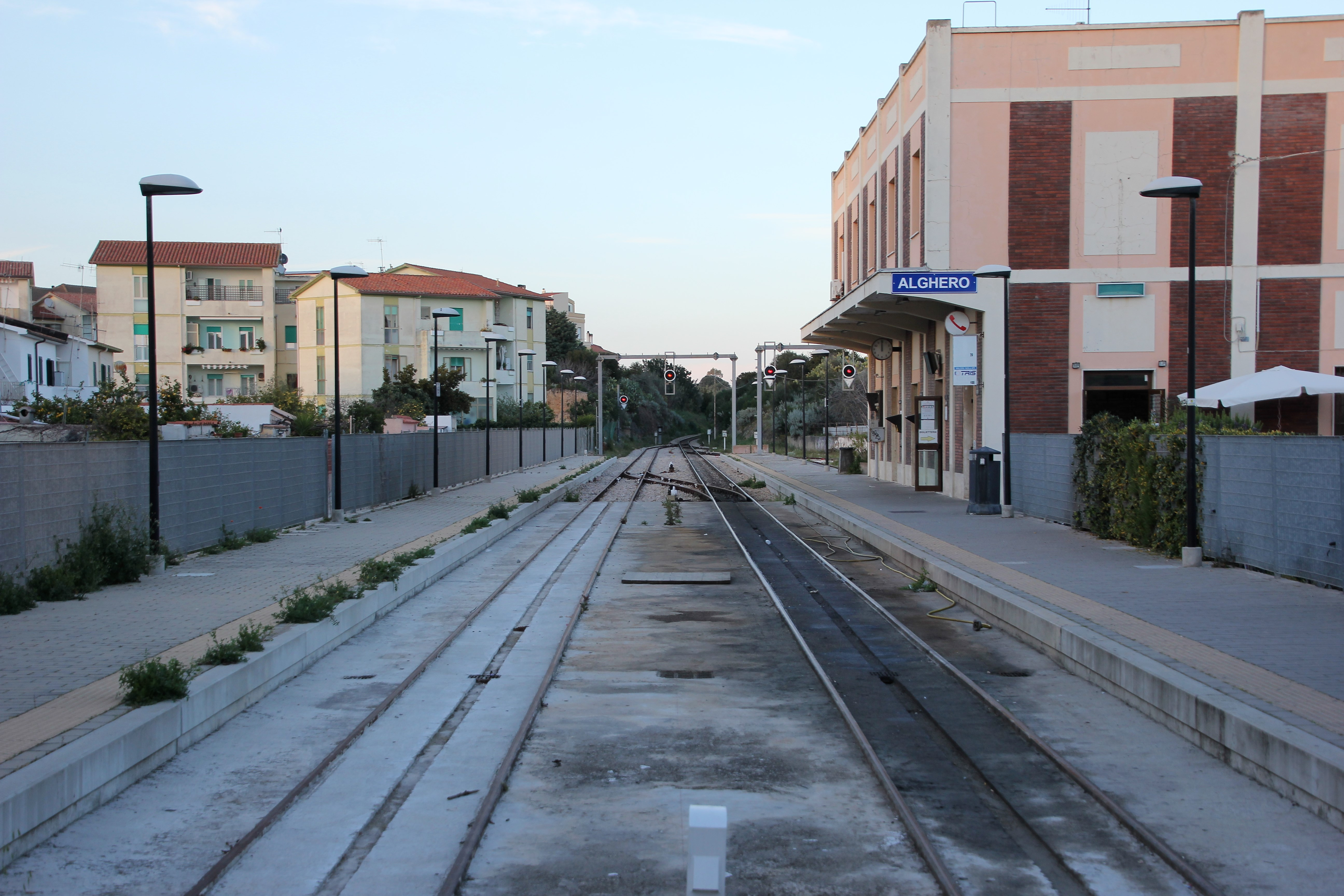 Alghero, stazione ferroviaria